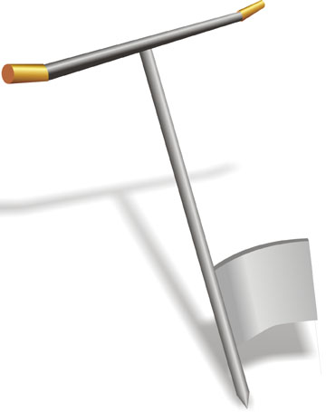 Lopata «Viatskiy Pahar» (Лопата «Вятский пахарь»)